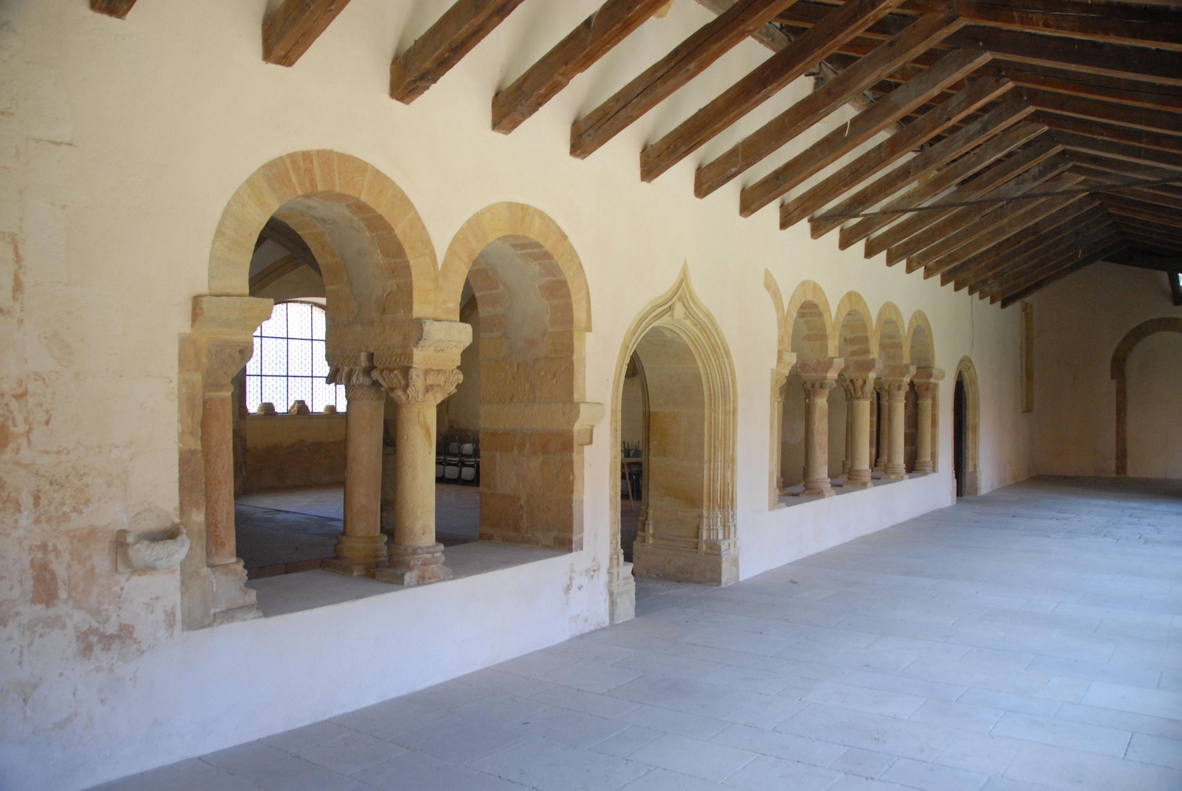 Kreuzgang, Ostgalerie